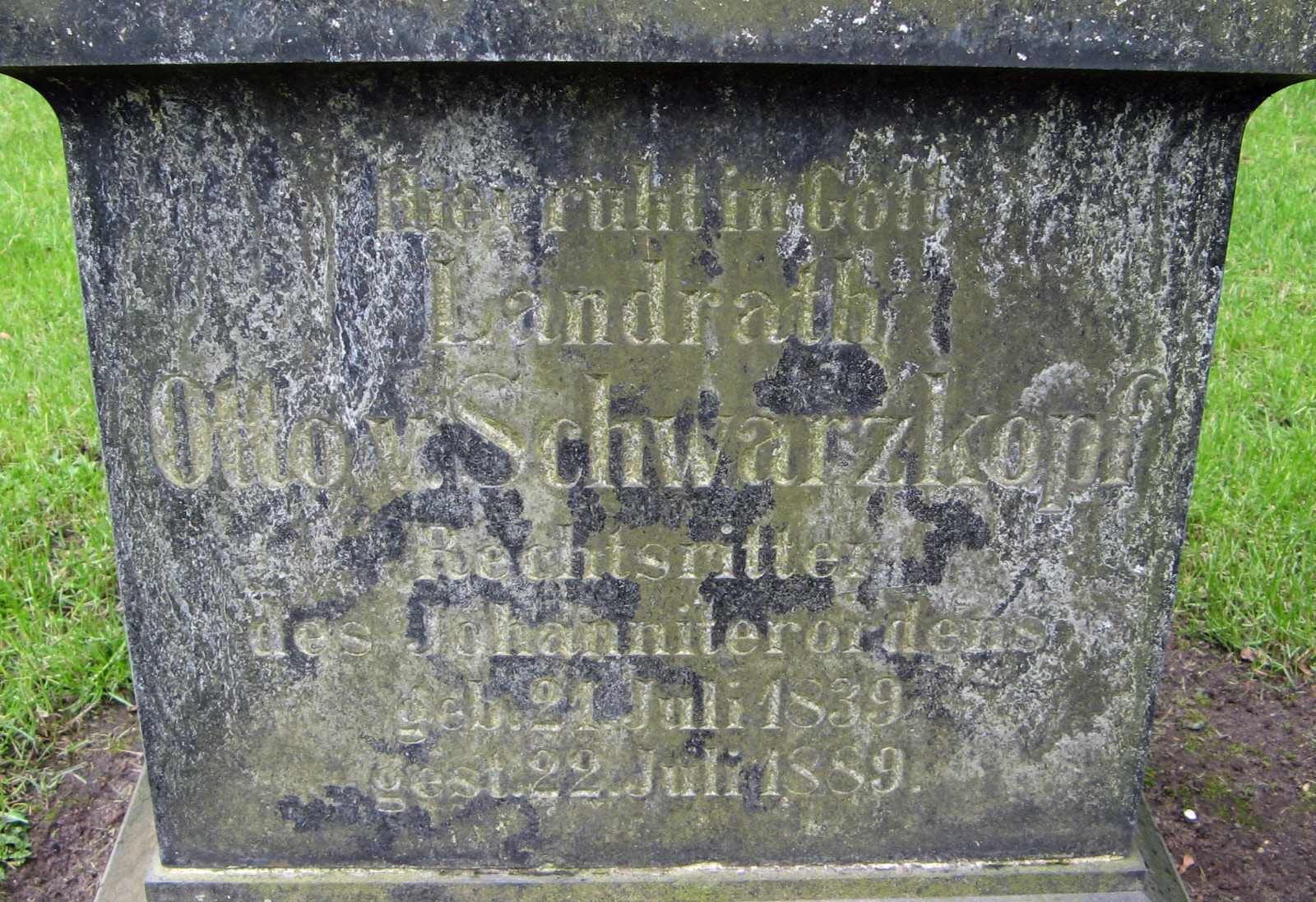 Grabstein von Otto von Schwarzkopf im Stadtfriedhof Engesohde, Hannover, Abteilung 40T, Grabnummer 1